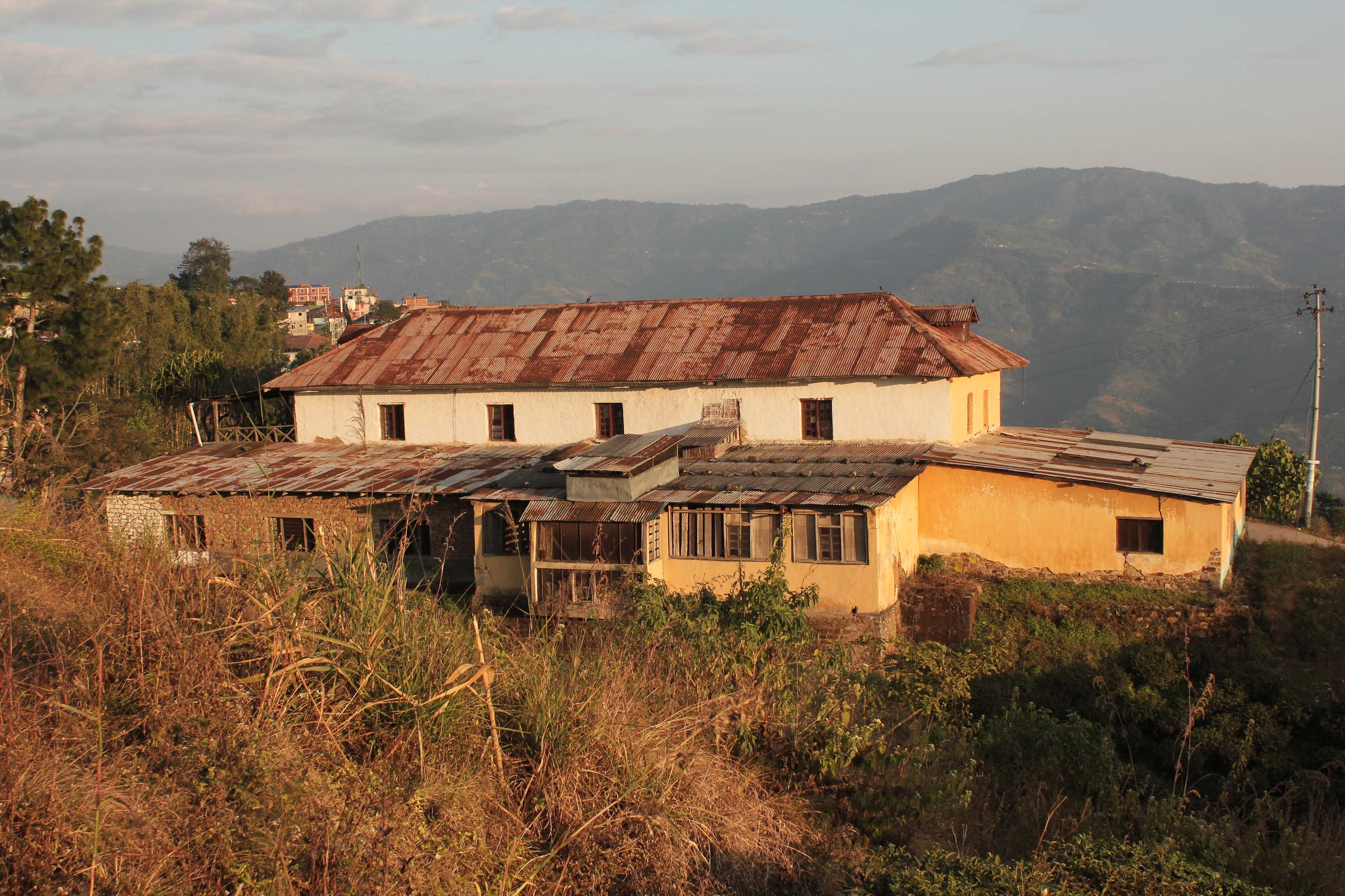 नेपाली: इलाम चिया फ्याक्ट्री विक्रम सम्बत १९३४